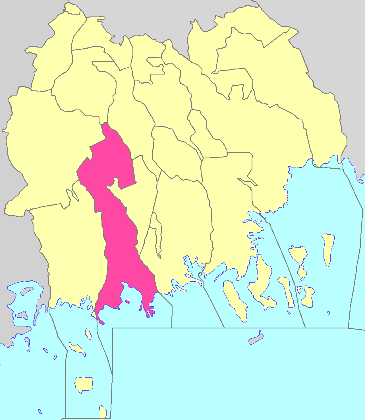 Образцово-Травінське сільське поселення